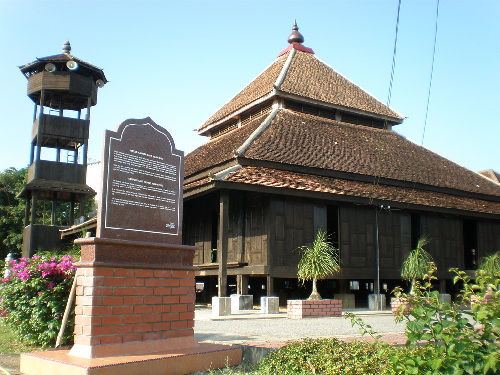 Masjid Kampung Laut yang dikembalikan.